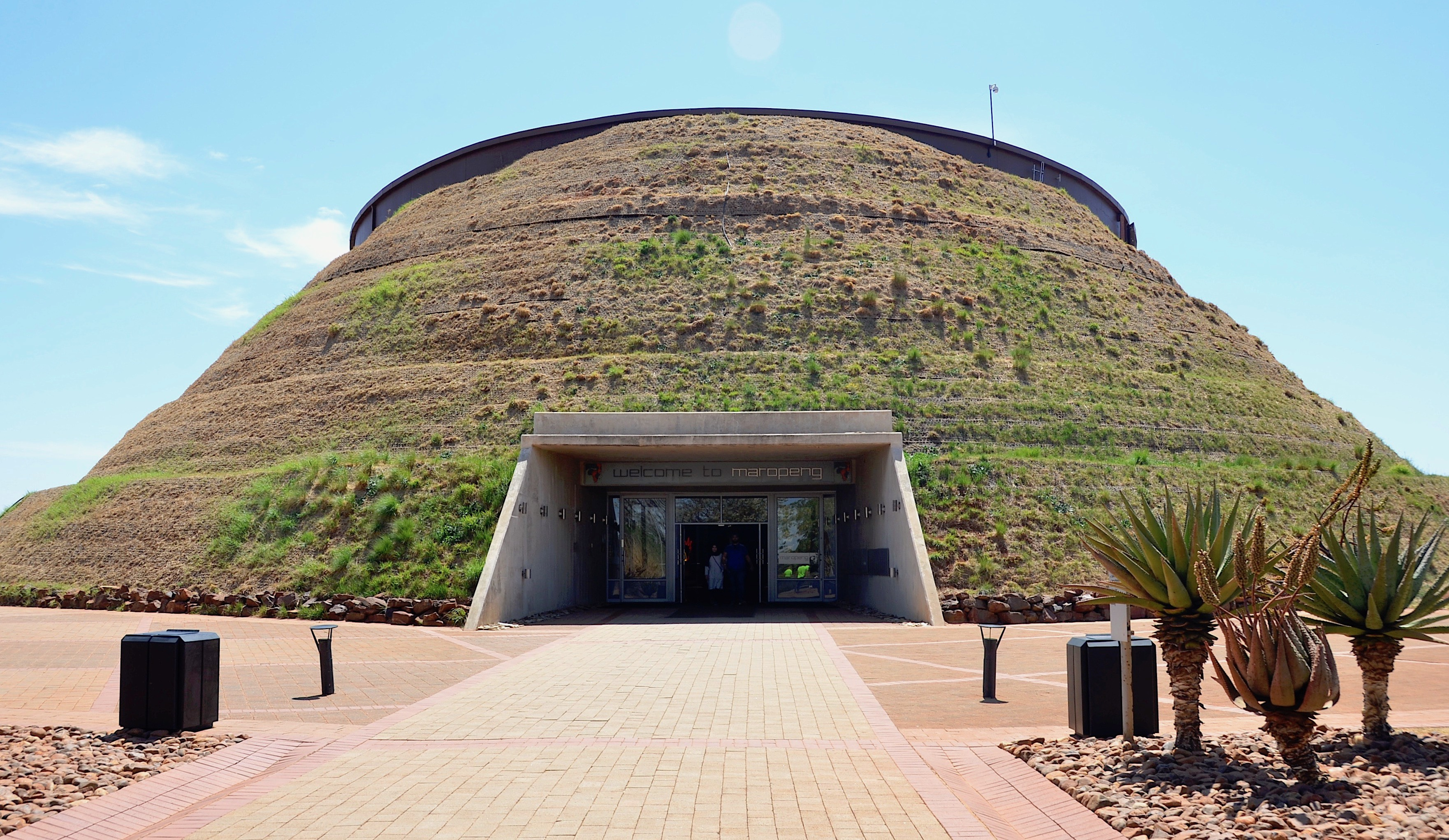 Maropeng Besucherzentrum Wiege der Menschheit in Südafrika